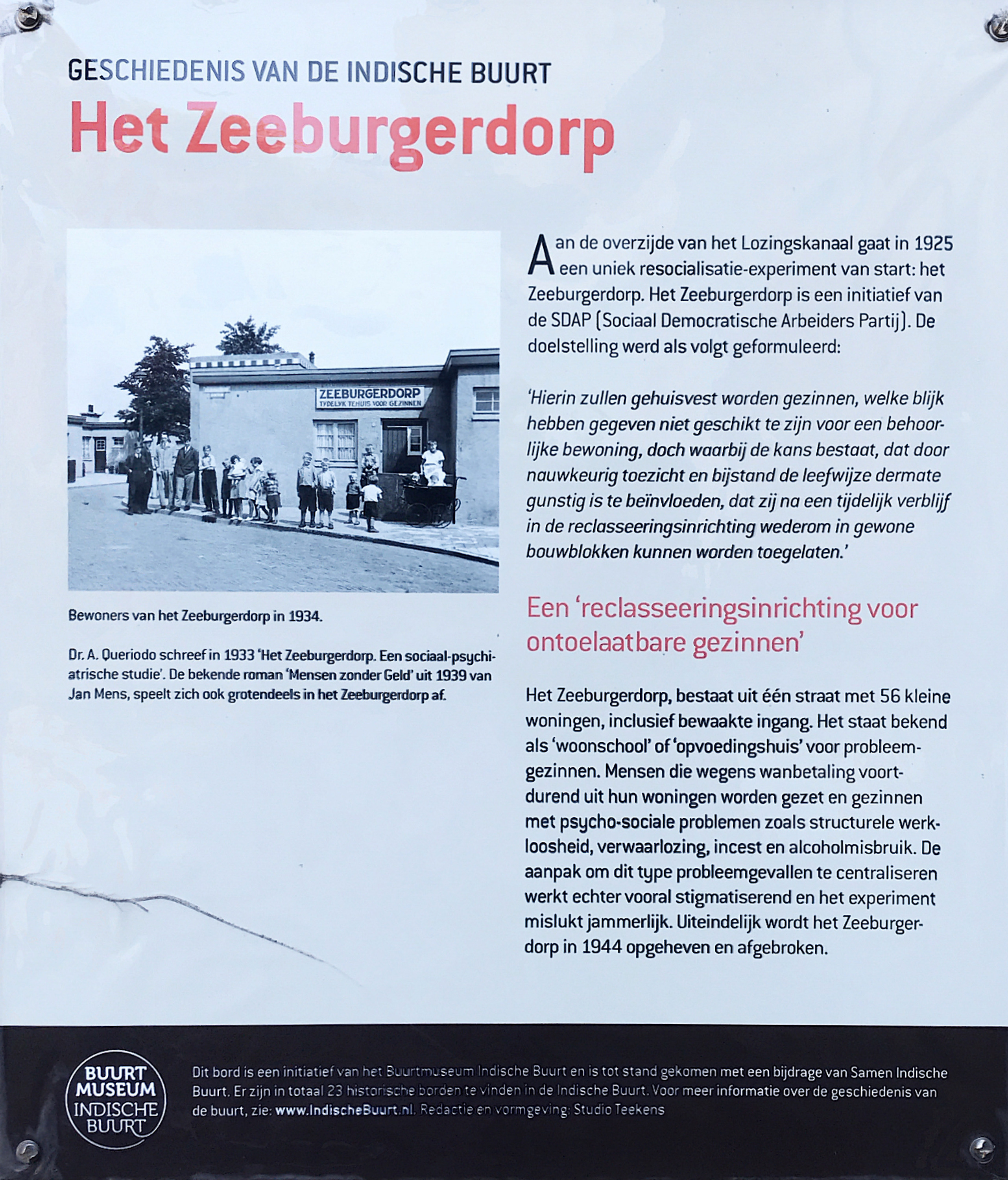 Plaquette met tekst mbt het voormalige Zeeburgerdorp en een afbeelding van bewoners uit 1934 (bron: Stadsarchief Amsterdam); informatiebord bevindt zich op de John Rädeckerbrug (brugnummer 1916)